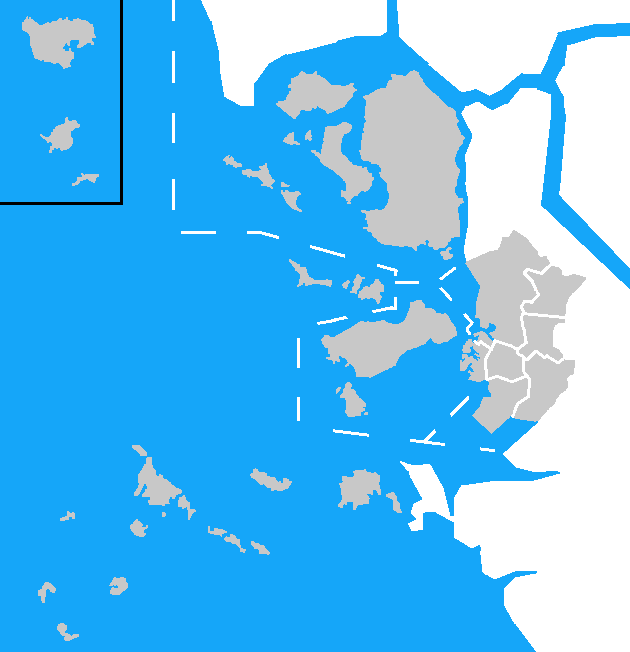 نقشه مناطق شهری کلانشهر اینچئون، جمهوری کره